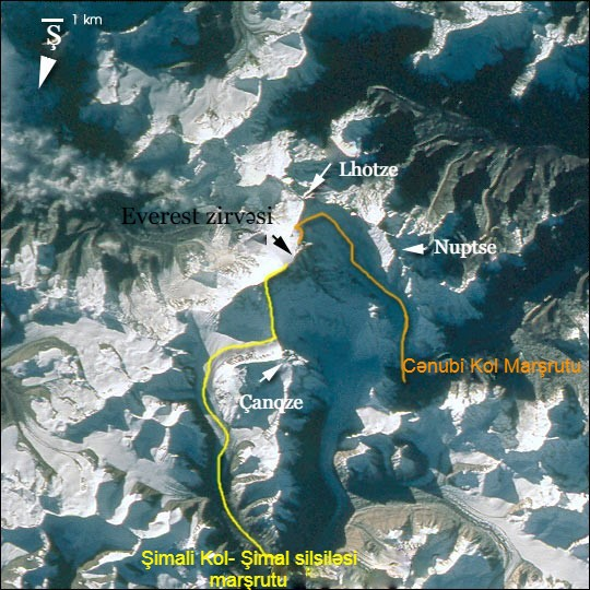 Everest zirvəsinin və dırmanış marşrutlarının Peykdən görüntüsü